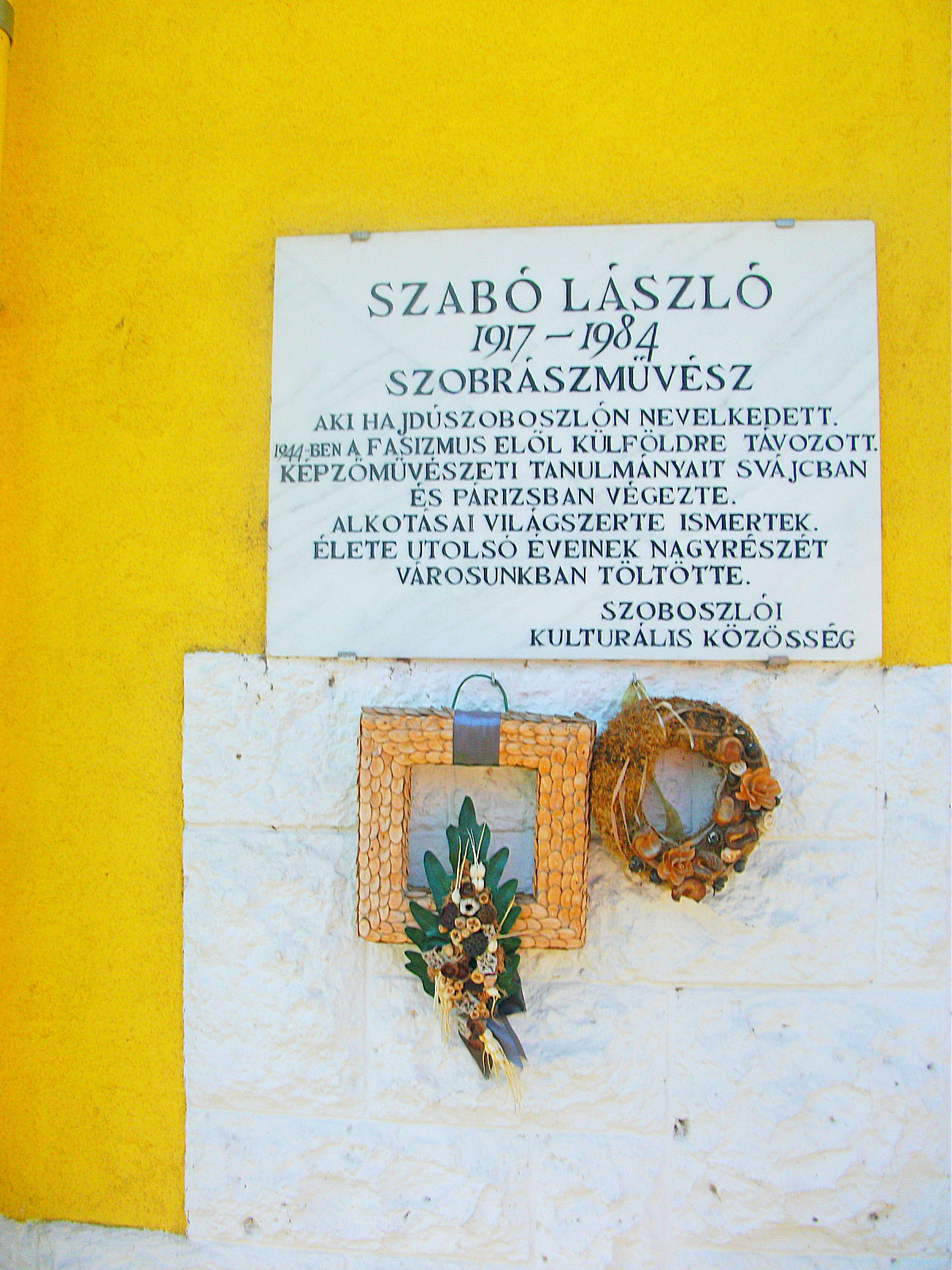 Szabó László emléktáblája Hajdúszoboszlón.